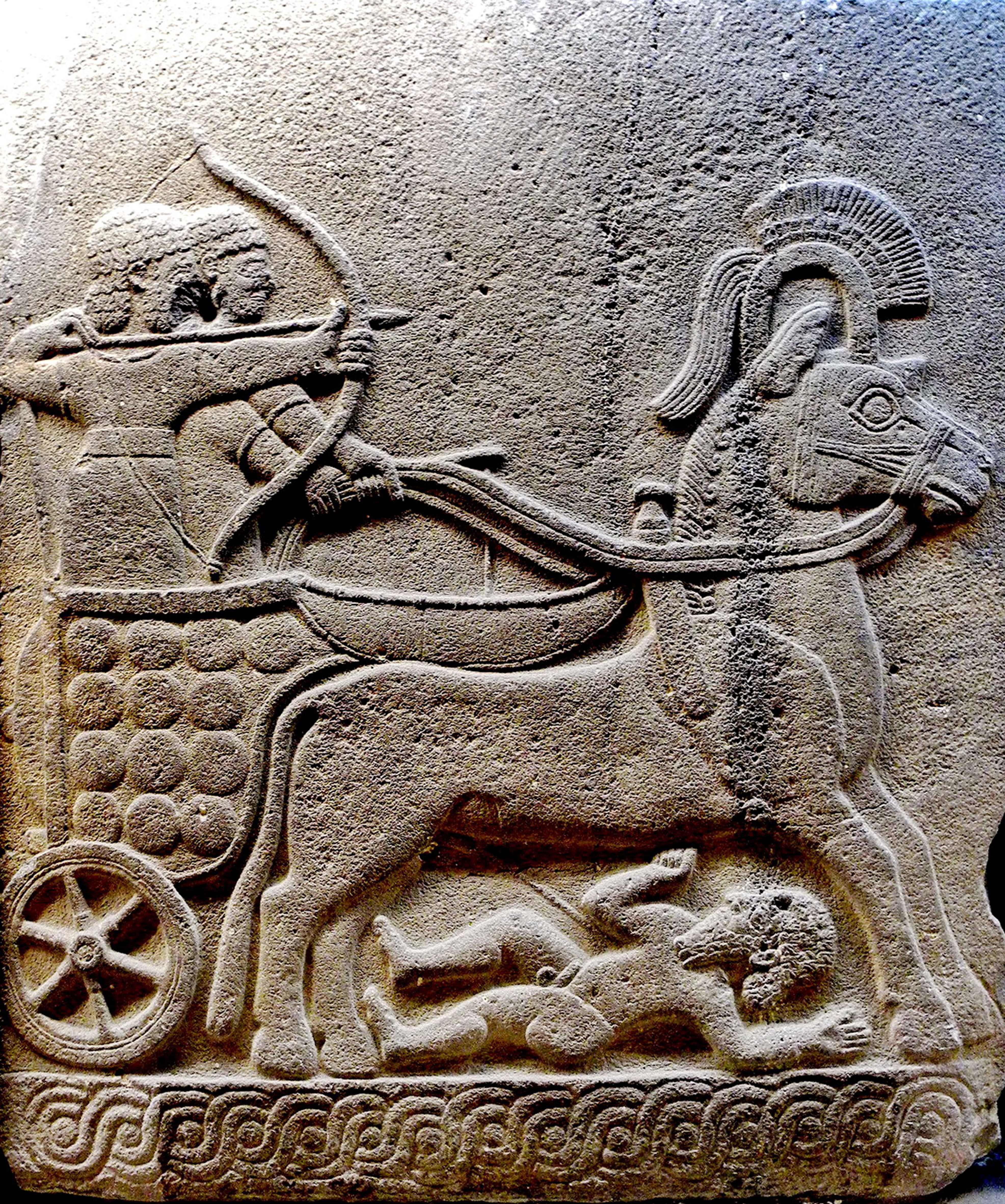 bas-relief Hittite : accident de char